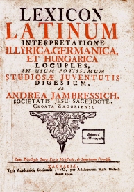 Lexicon latinum interpe illyrica, germanica et hungarica locuples …